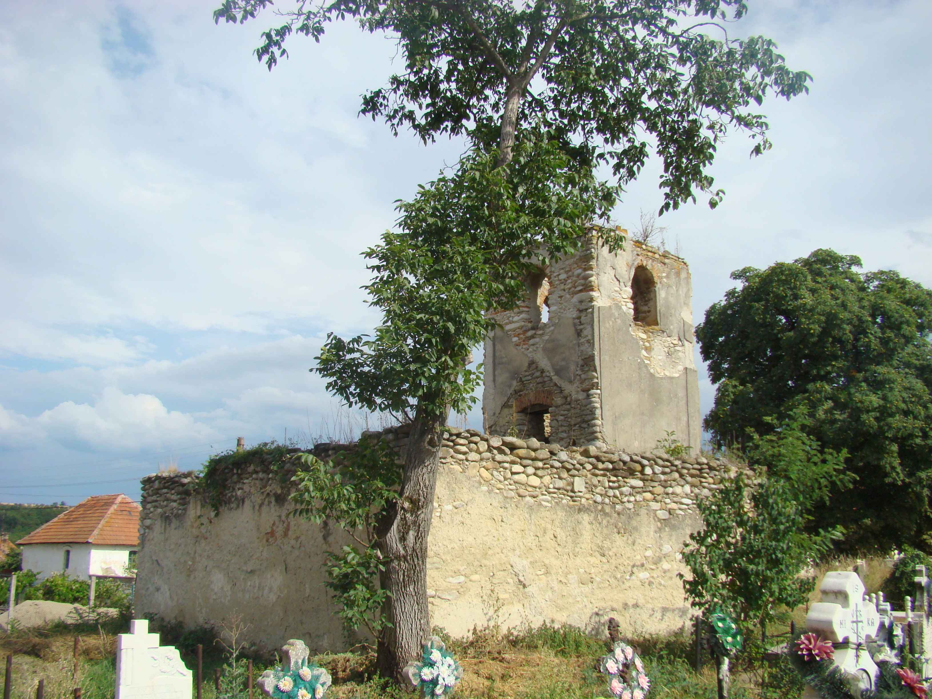 Biserica parohială reformată, sat Râu Alb; comuna Sălașu de Sus